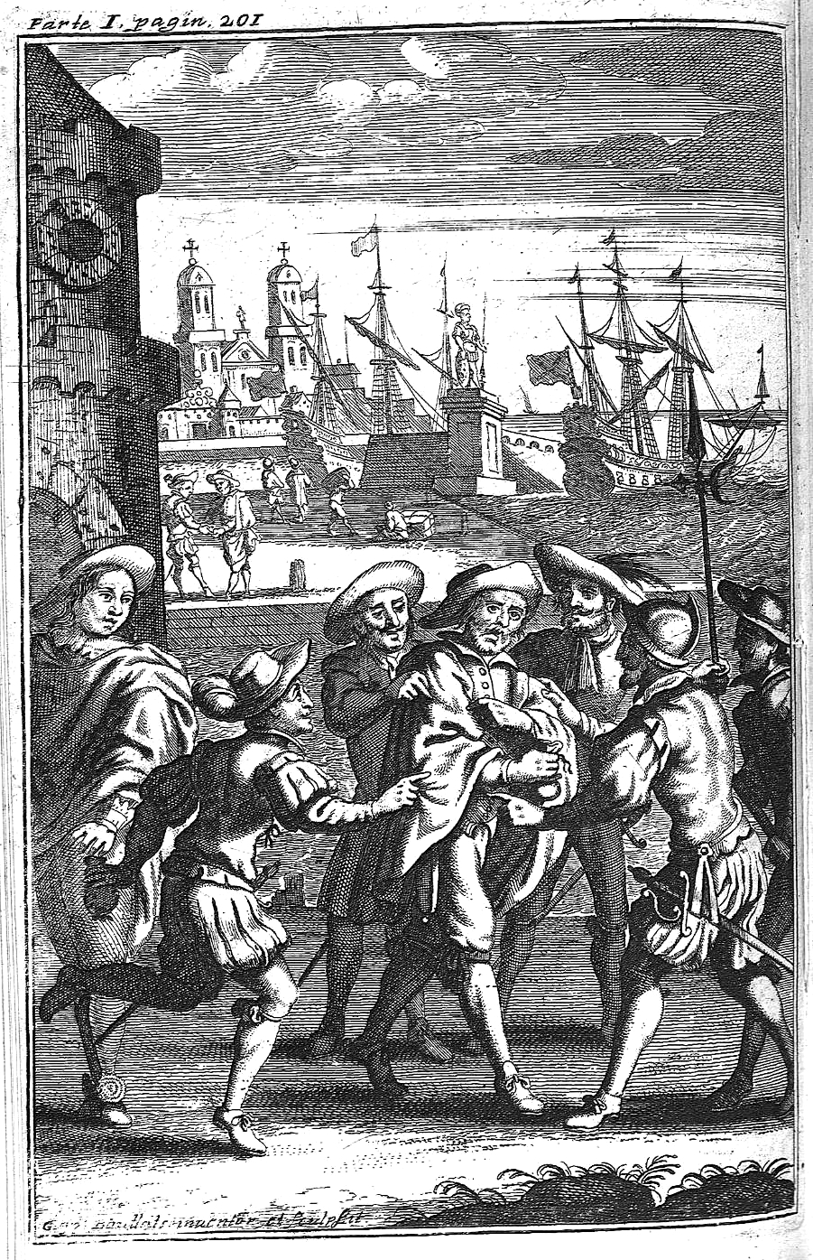 Grabado de la página 201 de Vida y hechos del pícaro Guzmán de Alfarache, atalaya de la vida humana, Amberes, Jeronymo Verdussen ..., 1681